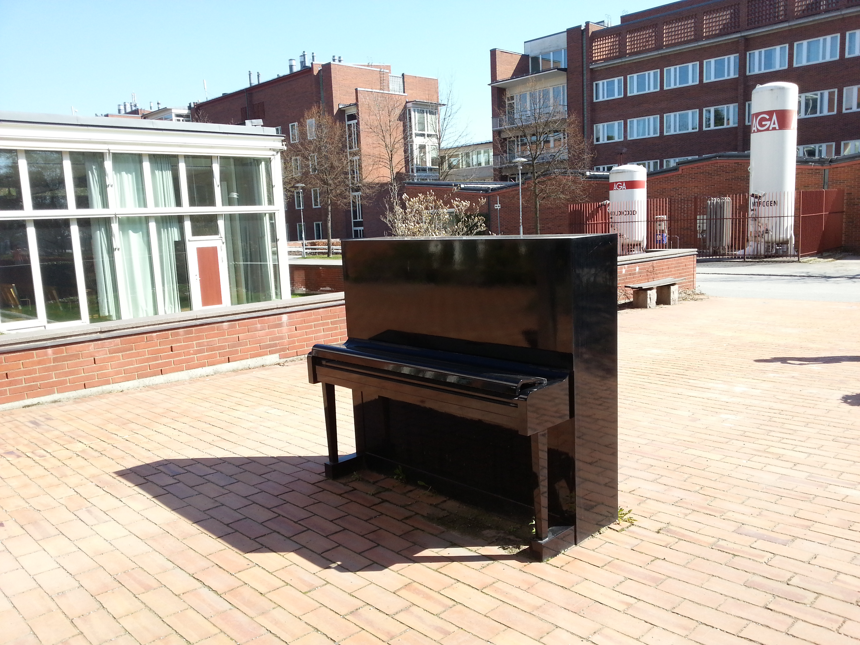 Instrument (2001) - Karin Ohlin It is not clear whether freedom of panorama applies to this image. This is a depiction of a building or work of art in Sweden. The depicted work is believed to be protected by copyright. According to Article 24 of the Swedish copyright act, "Works of art may be depicted if they are permanently placed on or at a public place outdoors. Buildings may be freely depicted." It has been widely accepted that this provision made distribution of depictions such as this one legal. On 4 April 2016, however, the Supreme Court of Sweden issued a statement that Article 24 does not extend to publication in online repositories, and on 6 July 2017, a lower court ruled that linking to depictions of copyrighted artworks hosted on Commons constitutes copyright infringement. See COM:CRT/Sweden#Freedom of panorama for more information. The implications of these decisions on Commons' ability to continue to distribute this and other depictions like it are currently under analysis. Reusing or linking to this file may have legal consequences. You are solely responsible for ensuring that you do not infringe the copyright belonging to someone else. See our general disclaimer for more information.